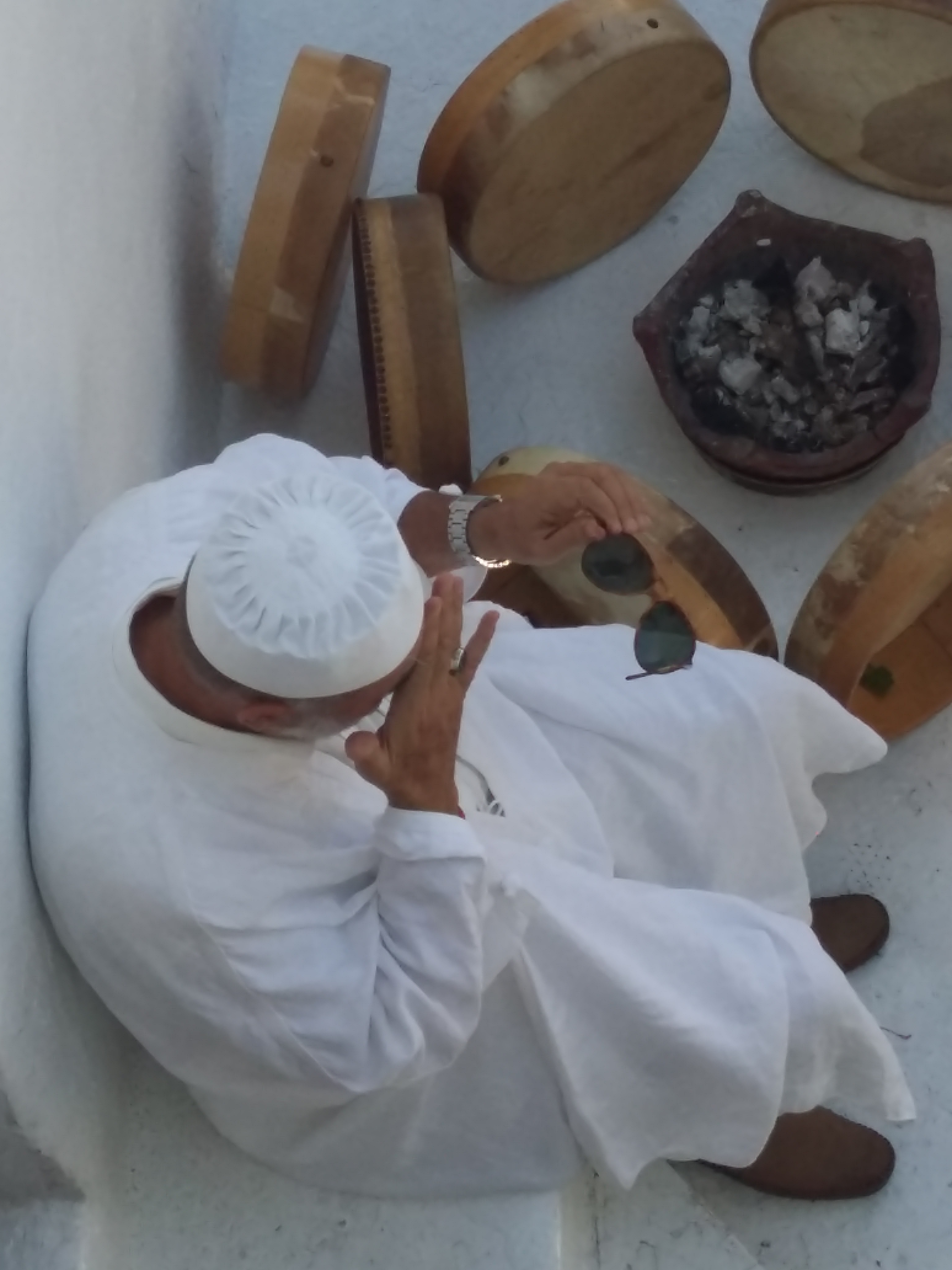 Kharja de Sidi Bou Said This is an image of Cultural Fashion or Adornment from Tunisia